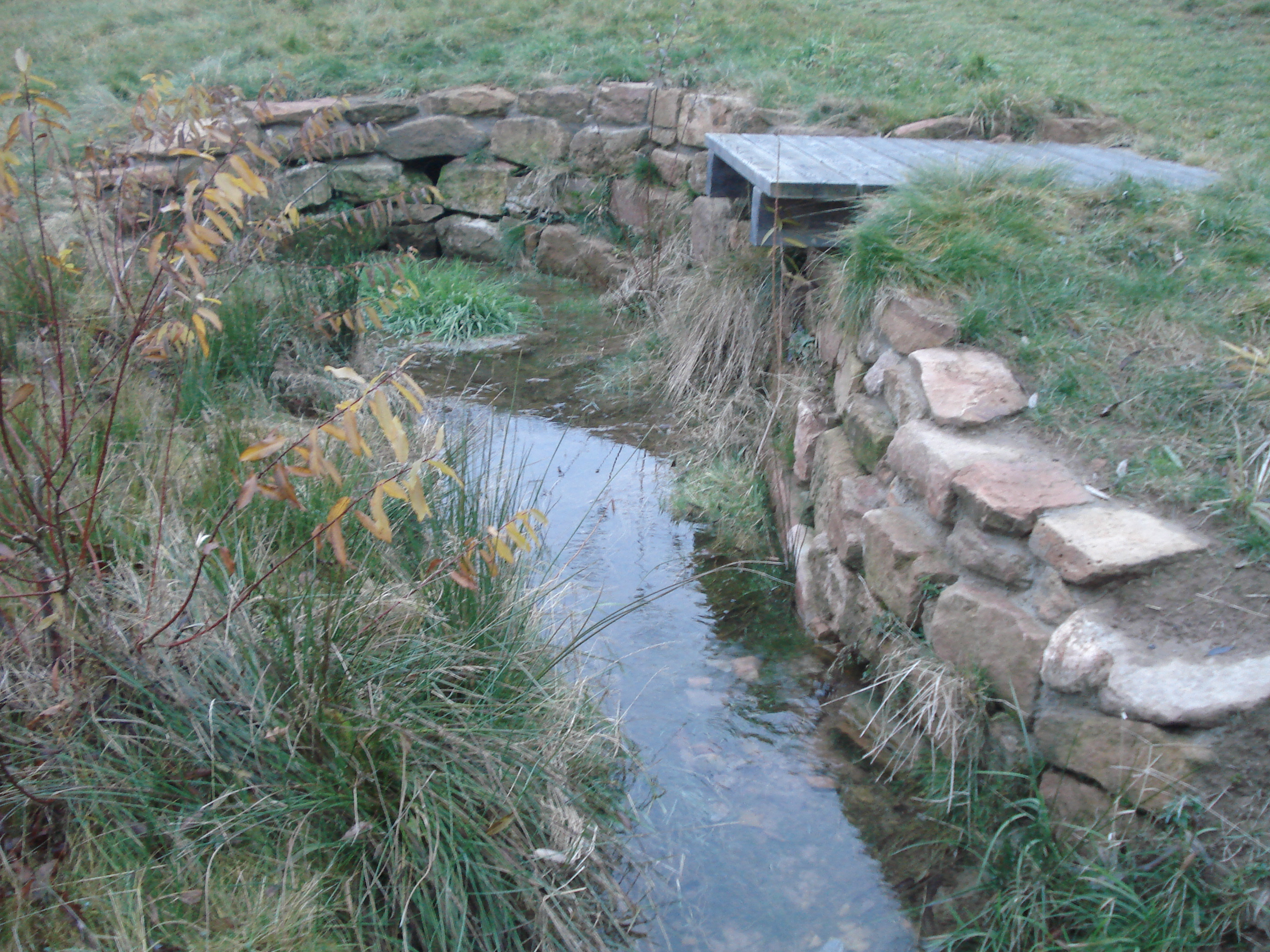 Die Quelle des Welzbachs in Wiesen